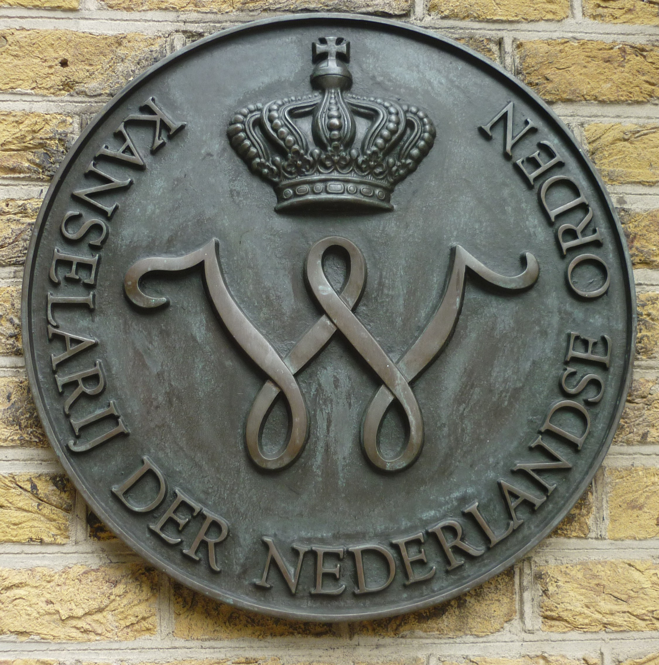 Nassaulaan 18, Kanselarij der Nederlandse Gemeenten, Den Haag